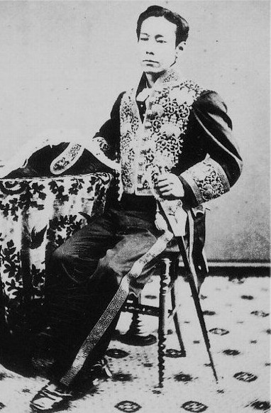 山内豊範の肖像写真。